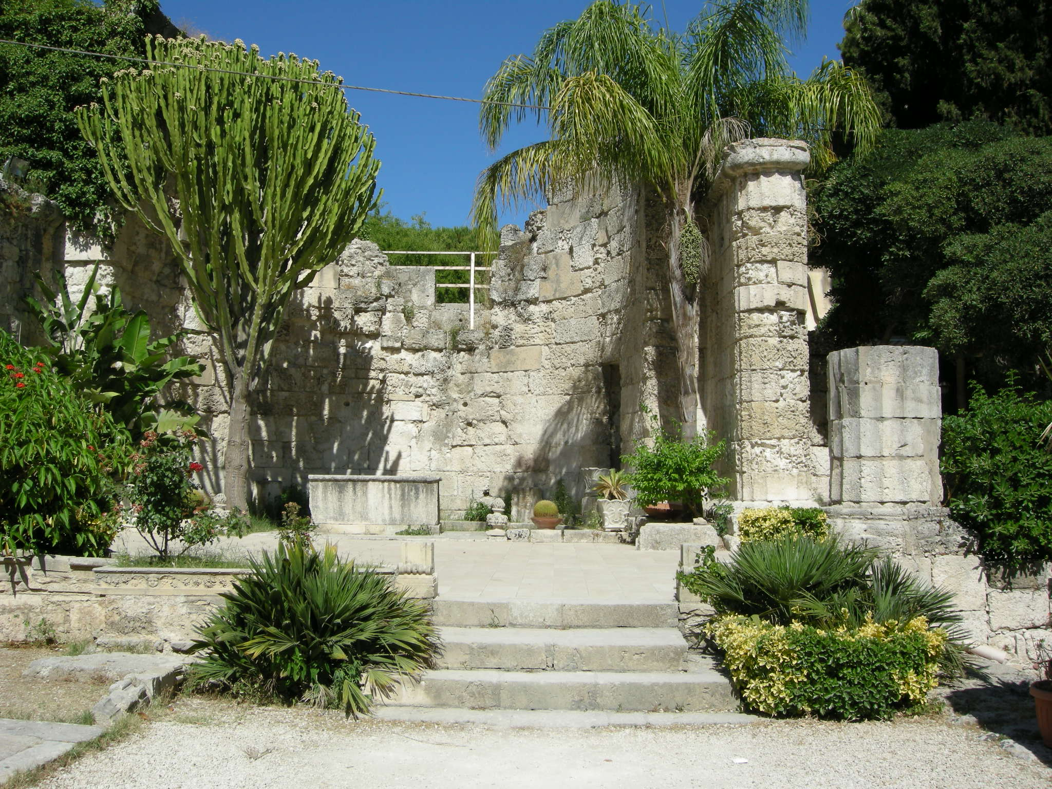 Siracusa, neapolis, chiesa di san giovanni, interno